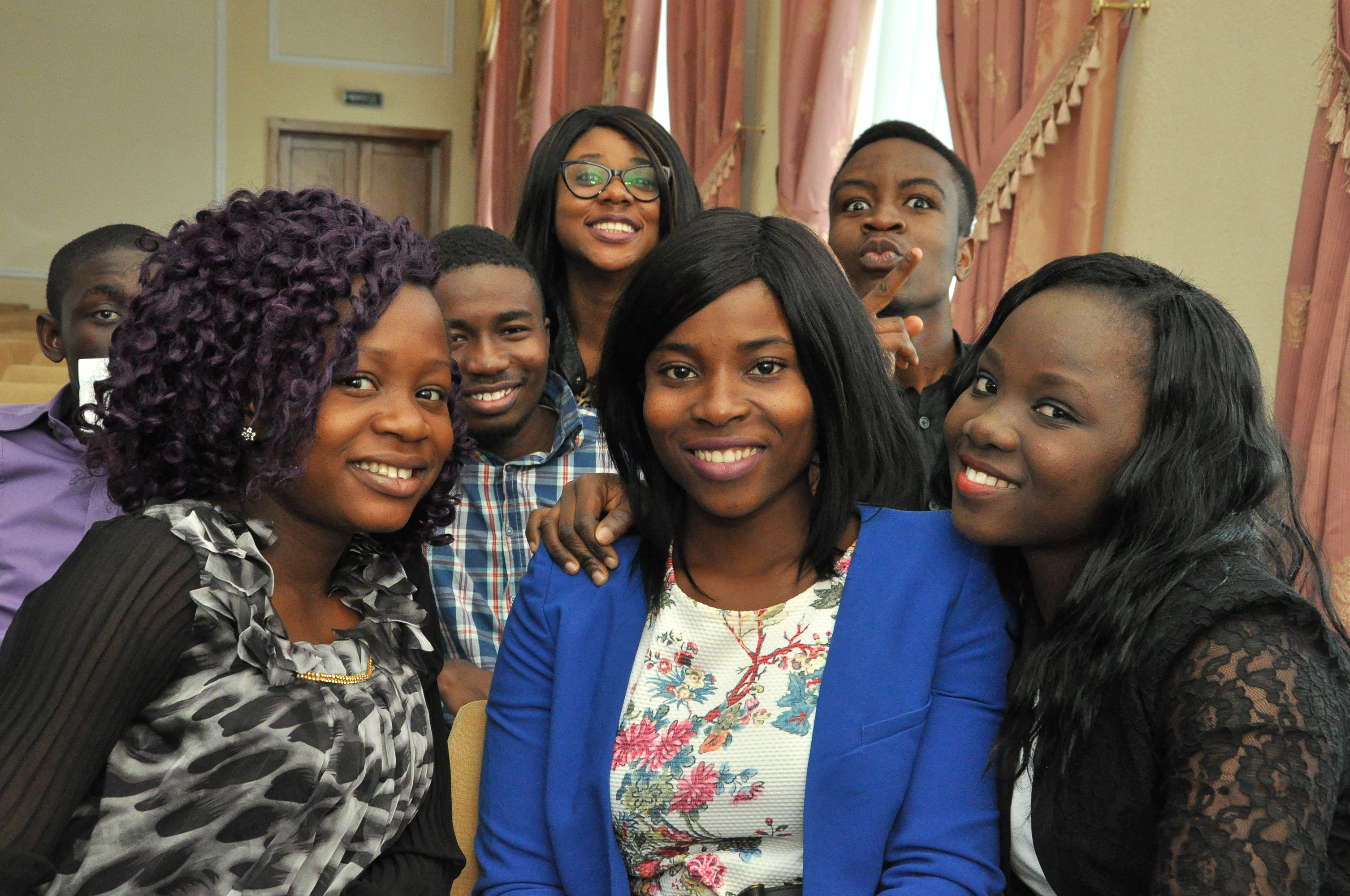 Літературно-музичне свято «Мова єднає нас», зорганізоване слухачами підготовчого відділення факультету іноземних студентів ТДМУ.